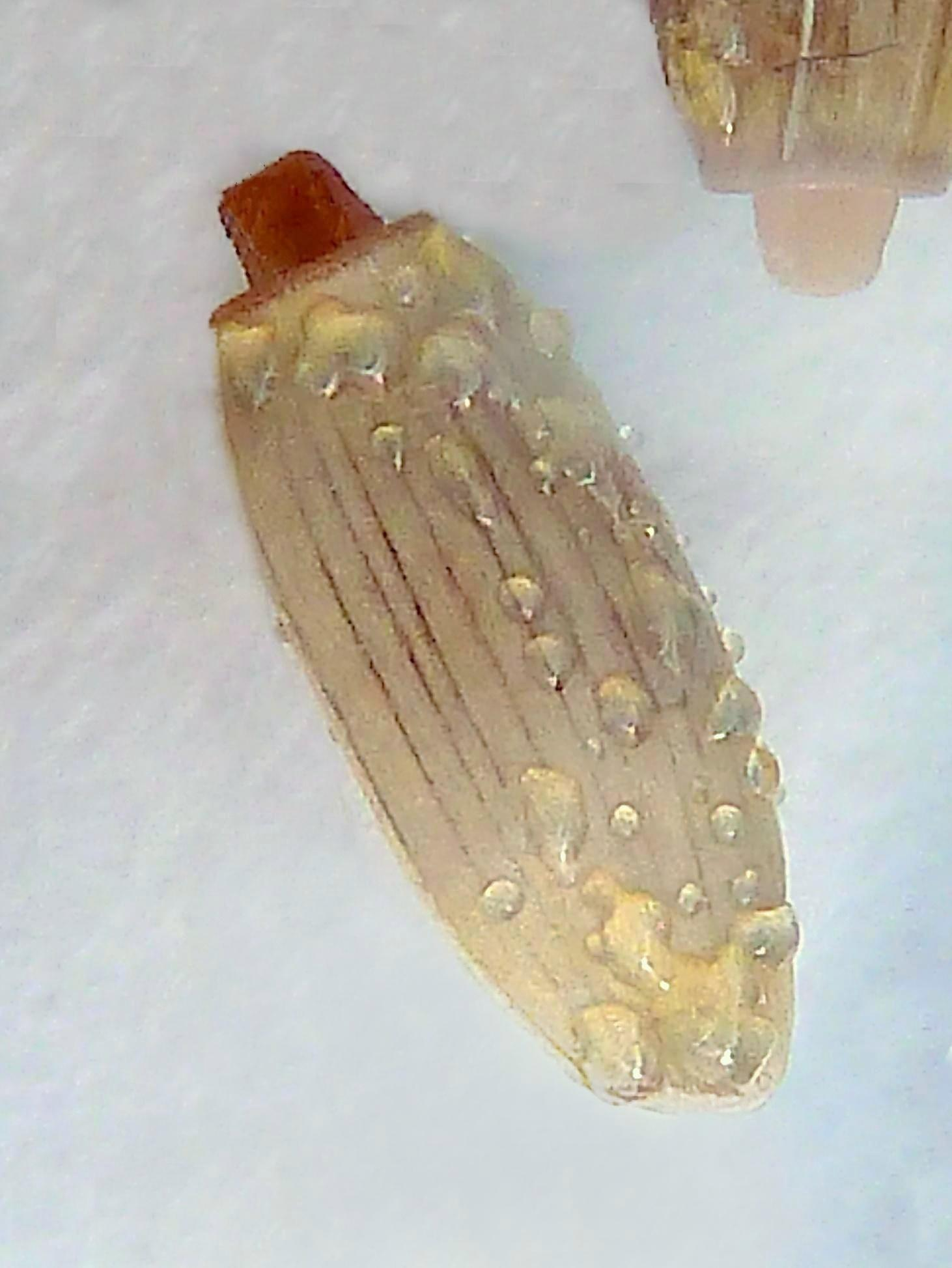 Carduus pycnocephalus (Cardo, cardo borriquero, cardo negro) - Cipsela suelta desprovista de su vilano caedizo en bloque: noten las gotas de liquido pegajoso exudado. Descampado circa Biblioteca, Albatera (Provincia de Alicante, España).